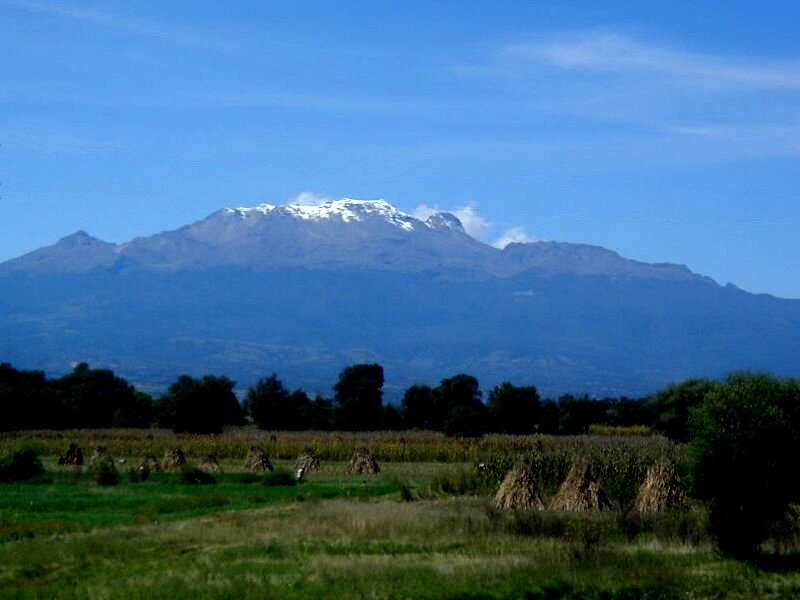 Az Iztaccíhuatl nevű vulkán.